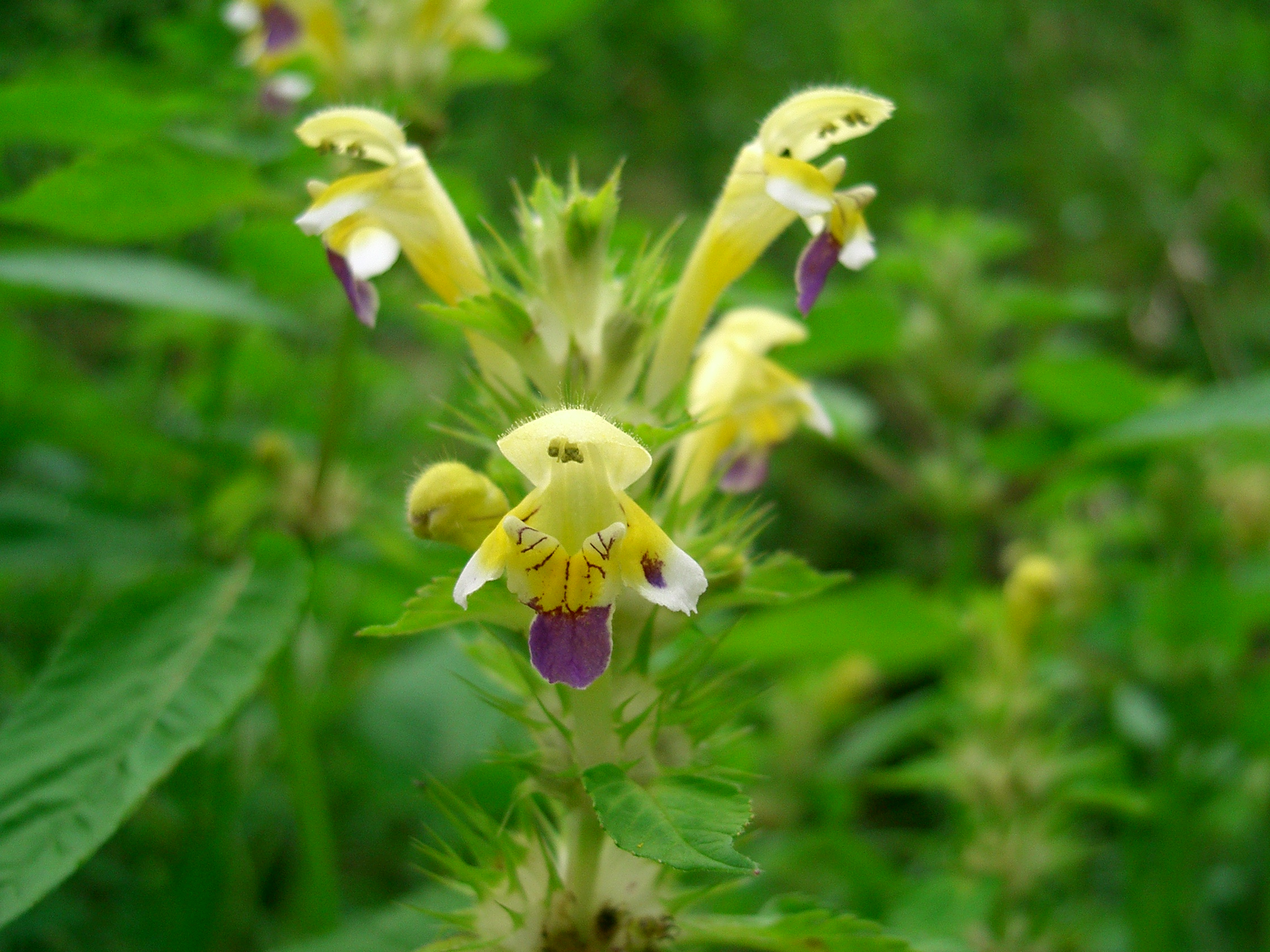 Bunter Hohlzahn (Galeopsis speciosa) am 24.07.2004 im Zellwald bei Nossen in Sachsen, Deutschland (Bestimmung dank Franz Xaver)